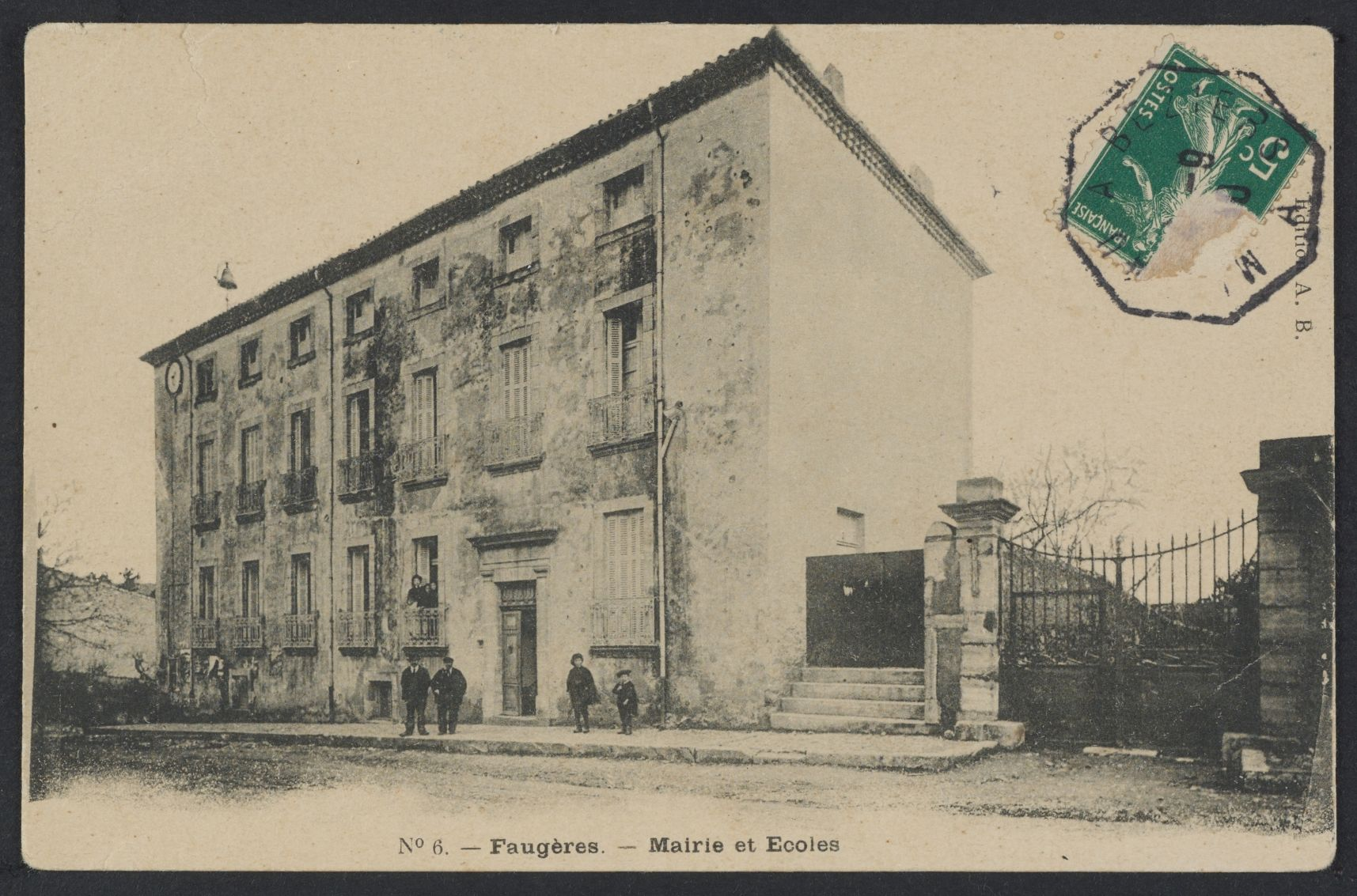 Faugères. - Mairie et écoles, 1ère moitié du XXe siècle